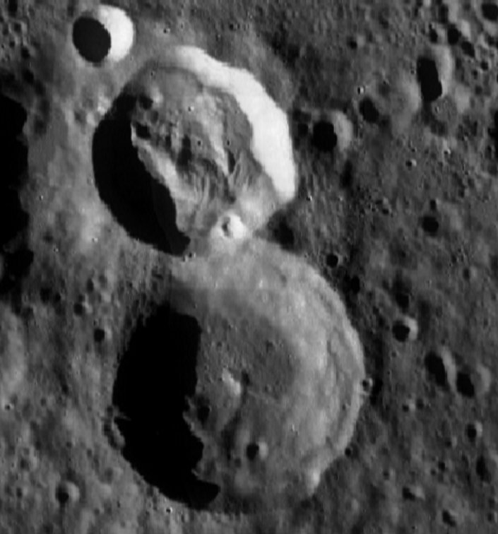 Cráter lunar Tsinger. (Imagen LRO)